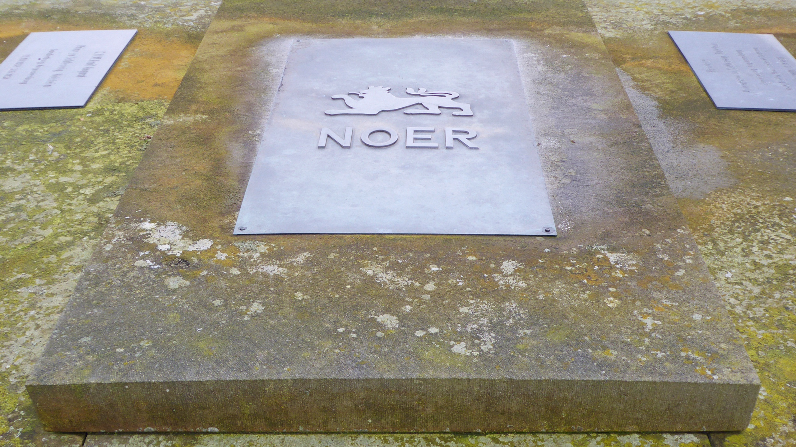 Familiengruft von Gut Noer auf dem Friedhof der Dreifaltigkeitskirche von Krusendorf: Gruft von Friedrich Emil August von Schleswig-Holstein-Sønderborg-Augustenburg - Prinz von Noer - Fürst von Noer - Foto Wolfgang Pehlemann P1350941